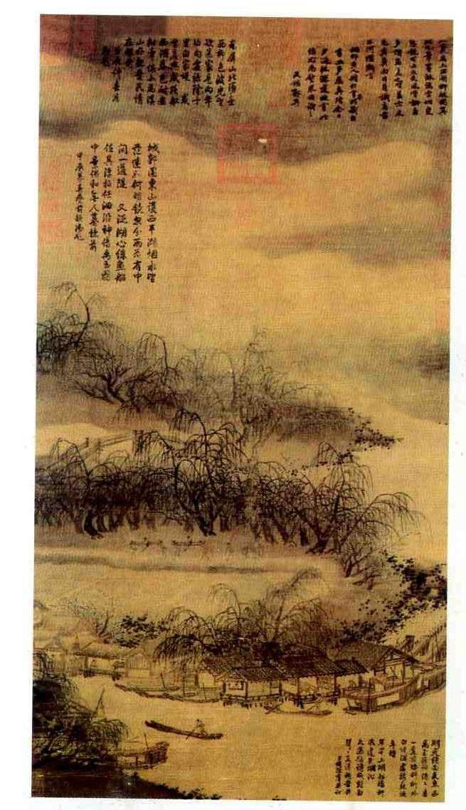 宋代·西湖柳艇图